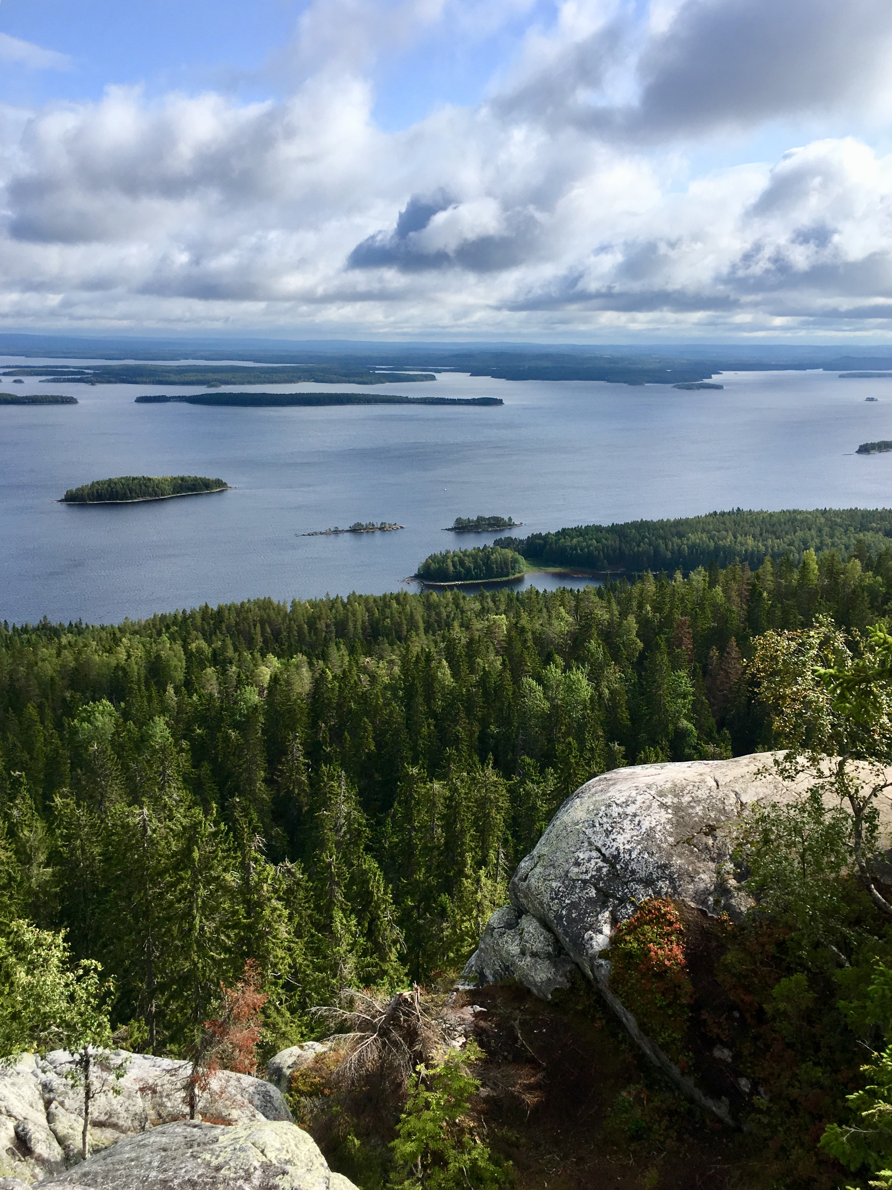 Koli